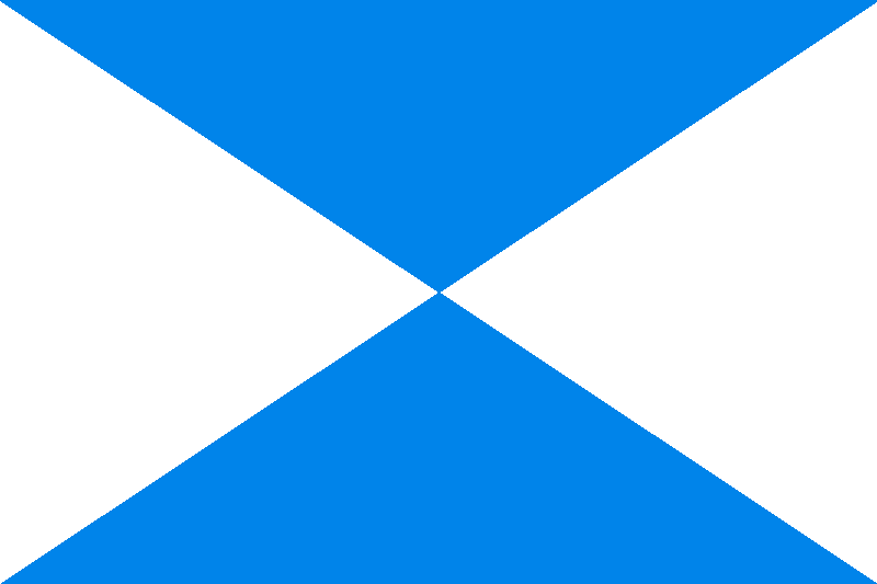 La bandiera dalla Provincia di Bari